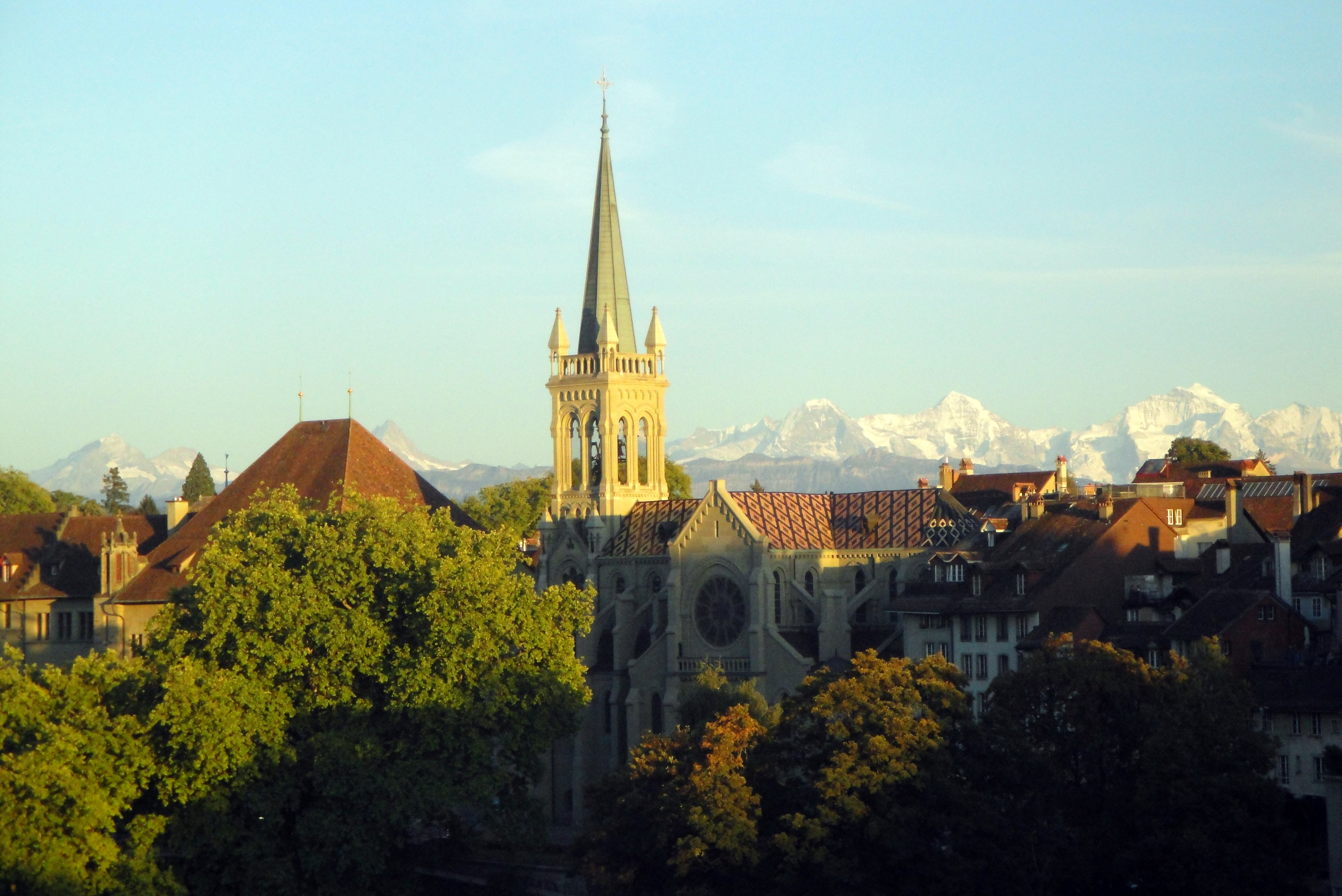 Bern, Christkatholische Kirche St. Peter und Paul